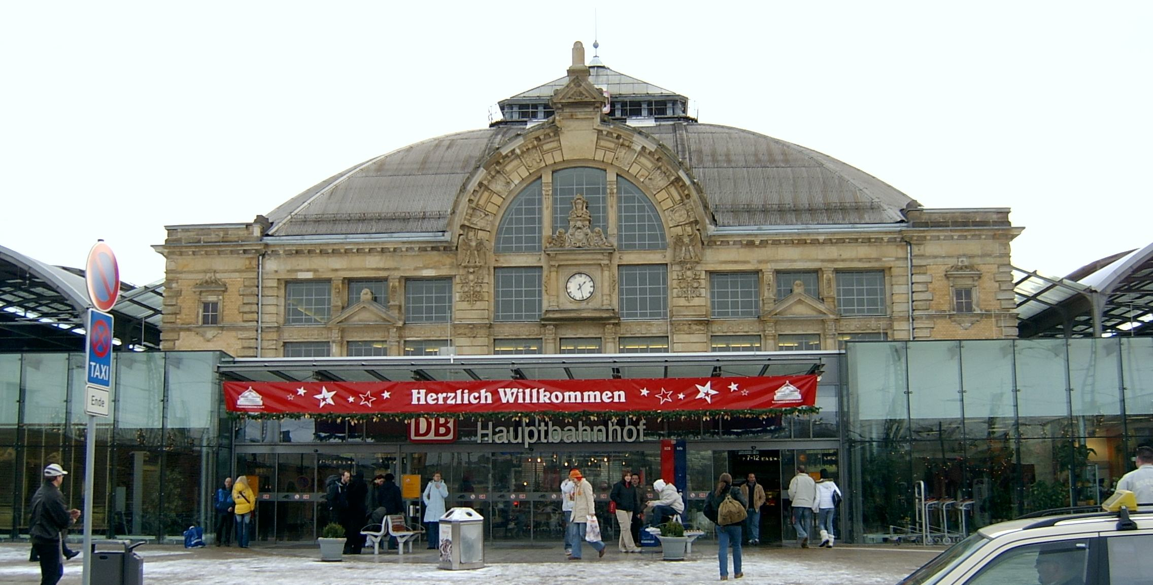 Hauptbahnhof Halle (Saale) Haupteingang. Object location 51° 28′ 39.0″ N, 11° 59′ 14.0″ E This and other images at their locations on: Google Maps - Google Earth - OpenStreetMap - Proximityrama(Info)